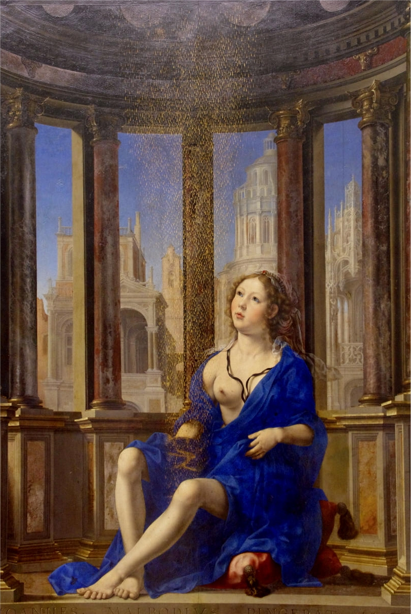 Yan Qossart Mabüs (1478-1532) Danaya (1527)